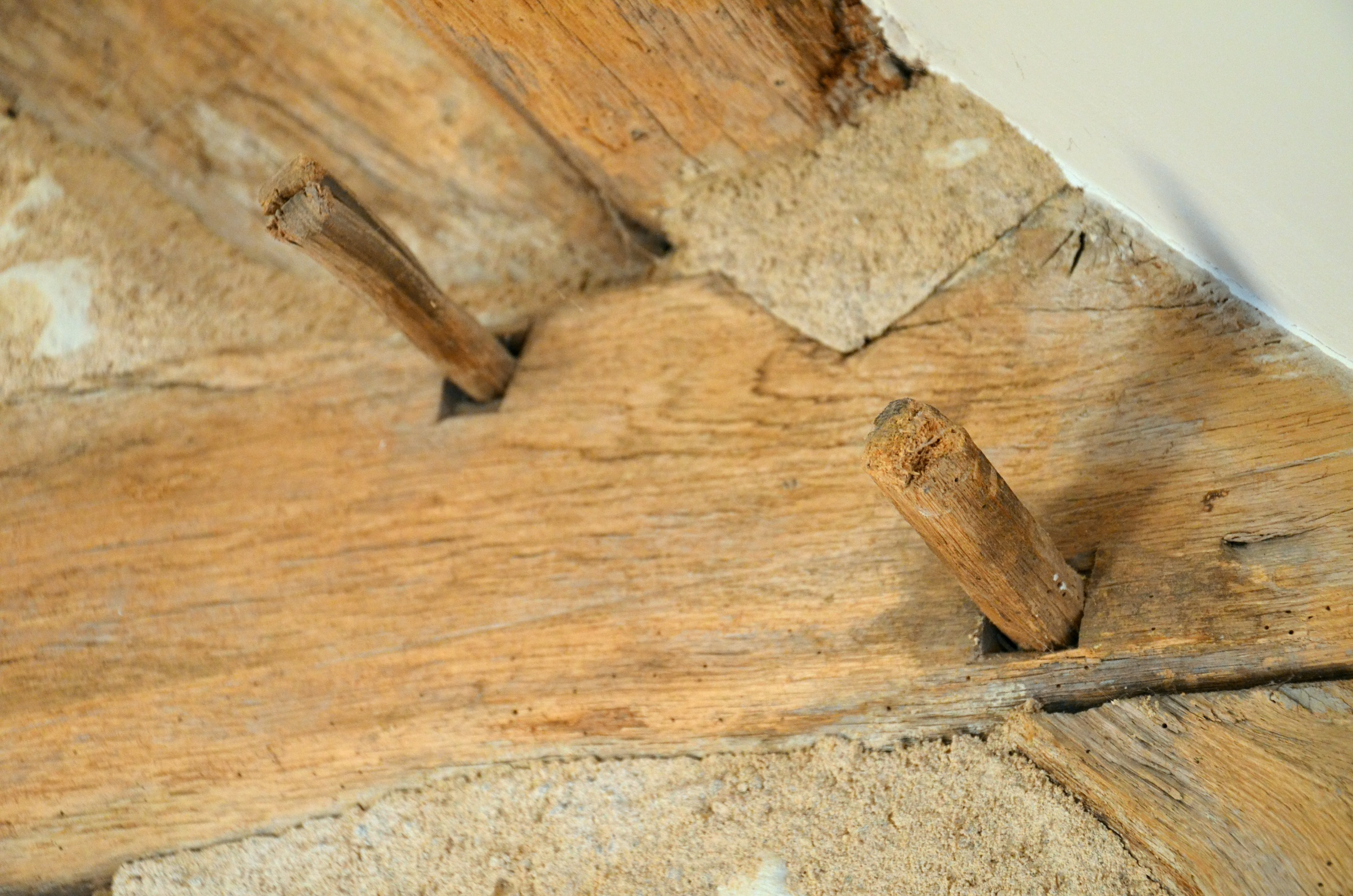 Deux chevilles en bois dans une charpente ancienne.